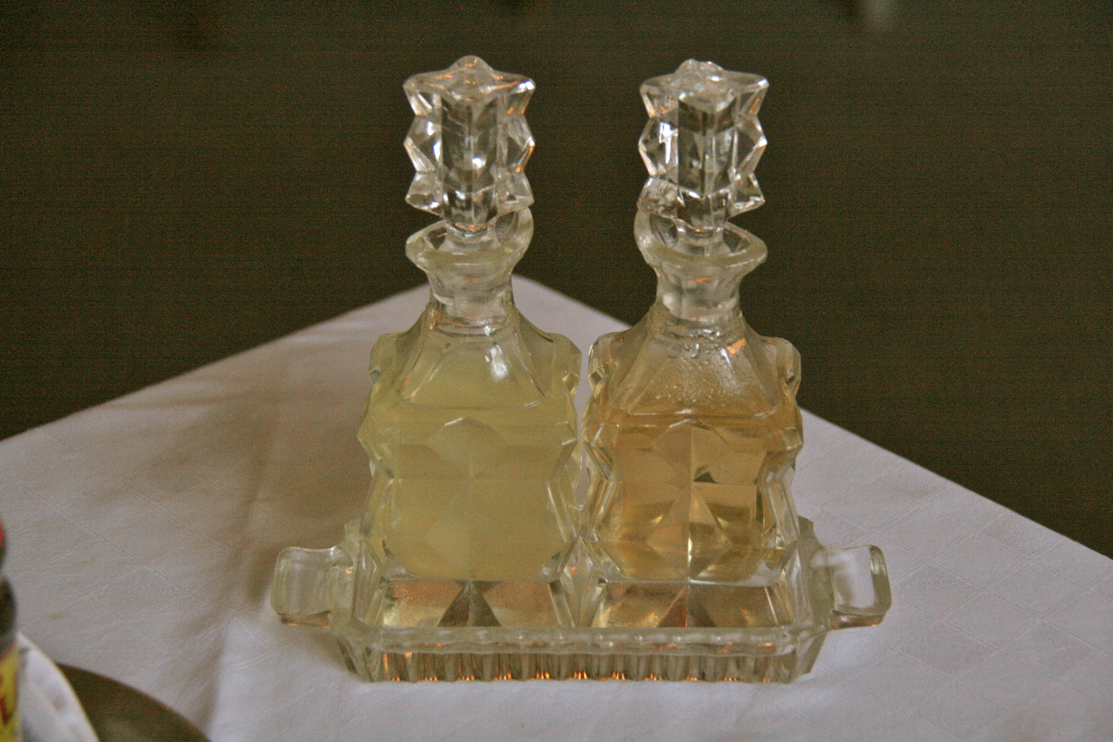 Vinagrera